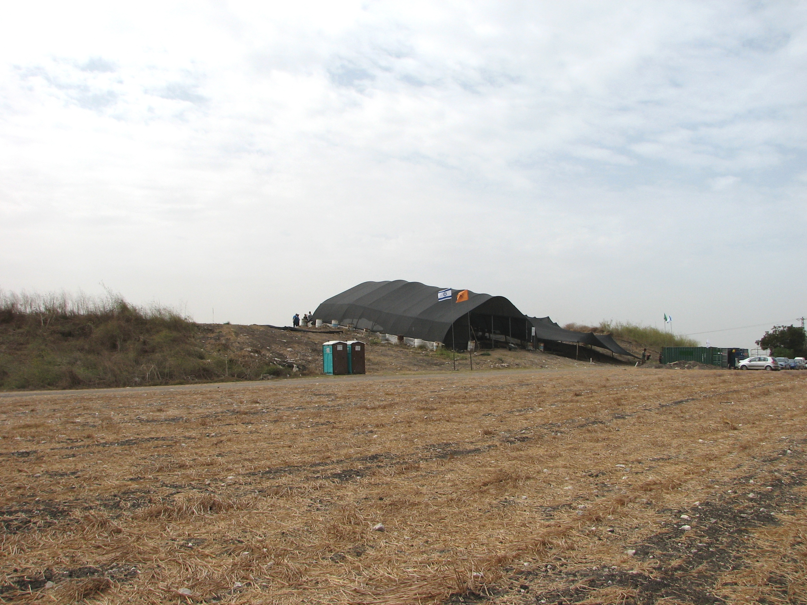 Tell Esur תל-אסור, שנמצא בפתחו המערבי של נחל עירון. התל נחפר על ידי הארכאלוג אדם זרטל בשנים 2001-2003 וכן על ידי שי בר מאוניברסיטת חיפה בשנת 2010 מראה כללי של התל מכוון מערב בעונת חפירות 2010